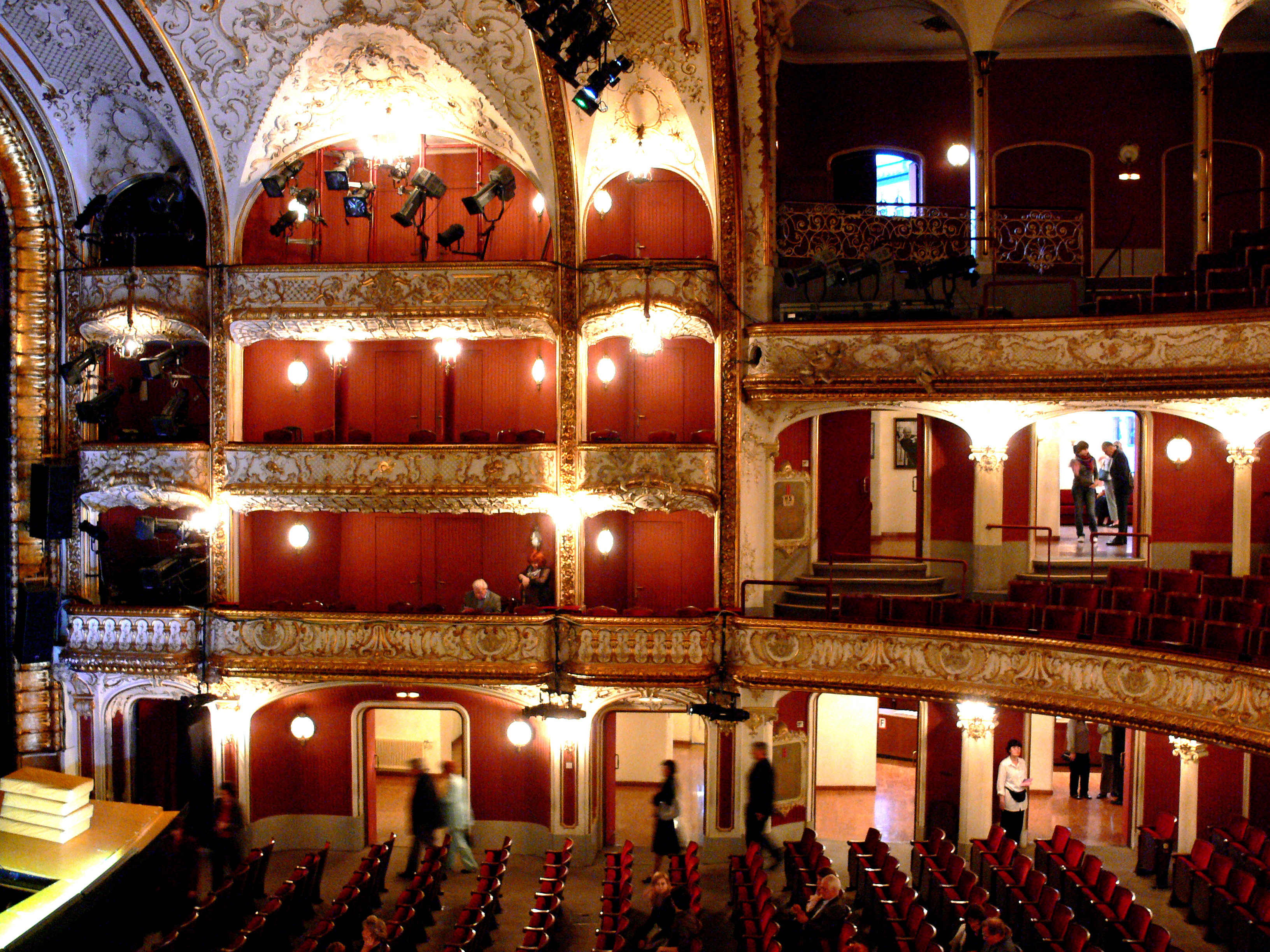 Wien, Volkstheater, Zuschauerraum